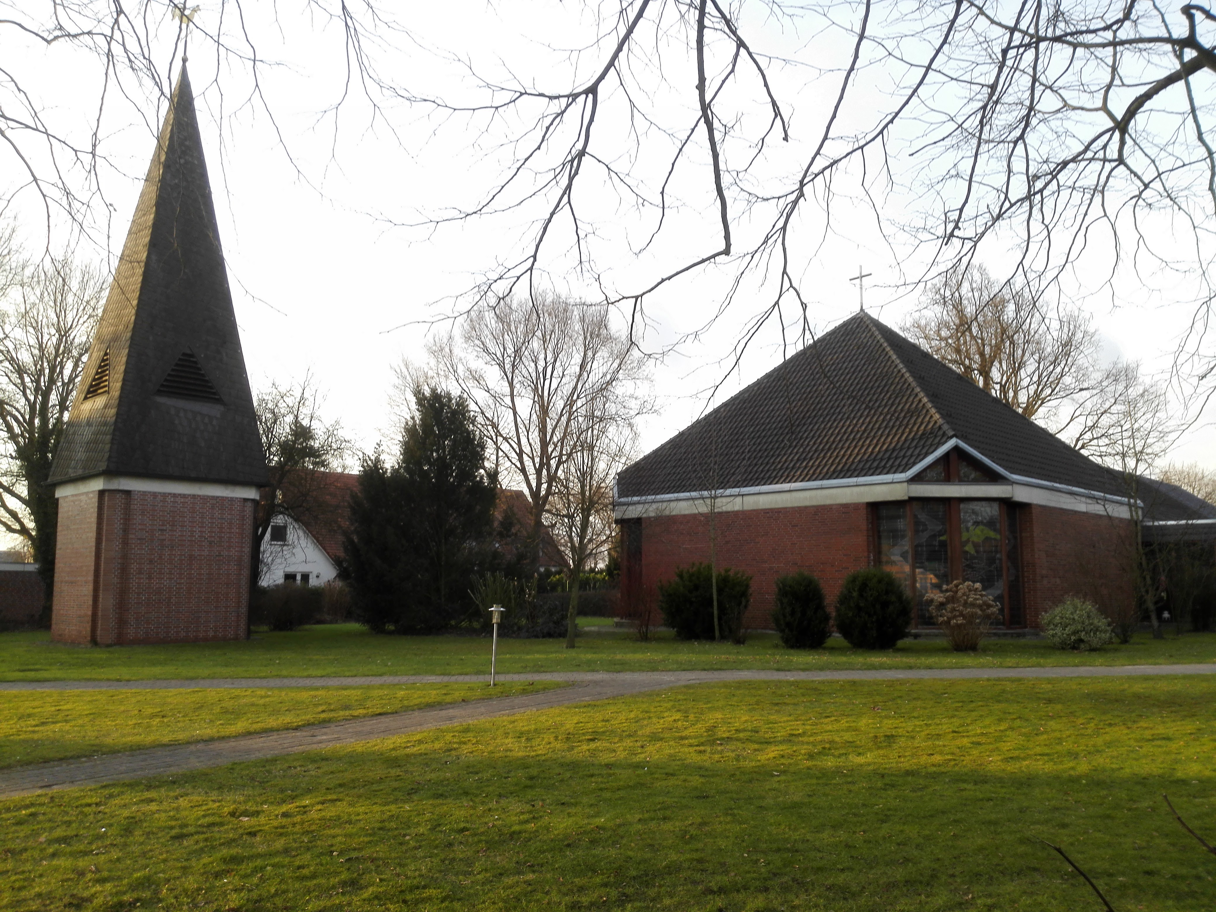 Kirchturm und Gemeinderaum, Tarmstedt